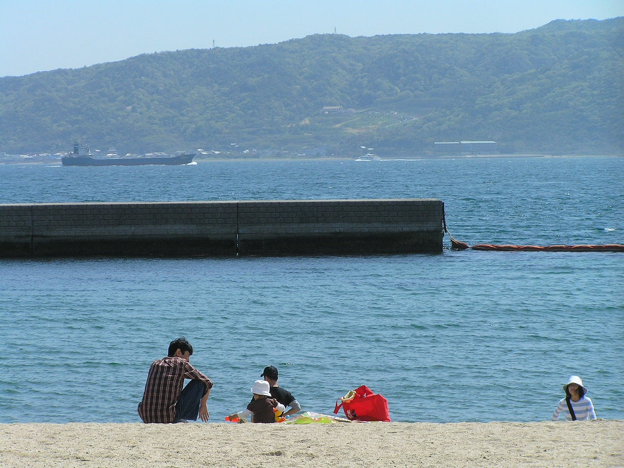 明石市大蔵海岸